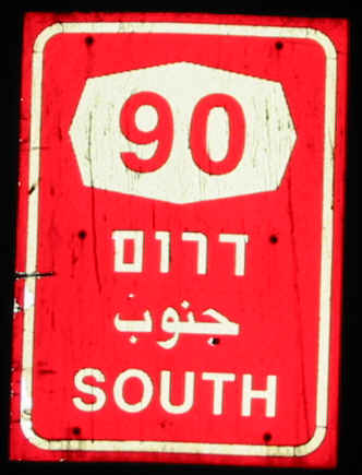 Roasd 90